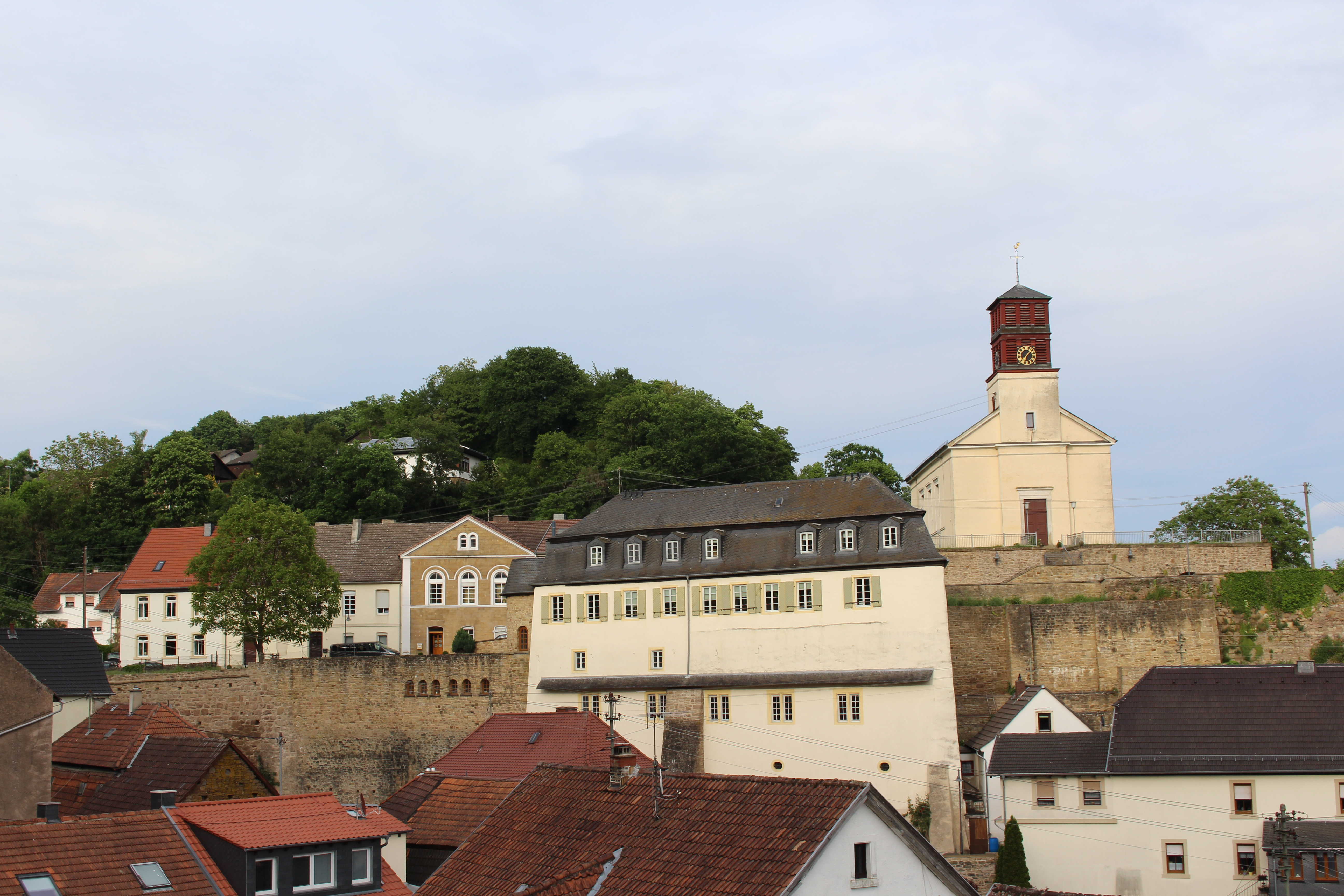 von der im 13. Jahrhundert errichteten wildgräflichen Burg Grumbach nur noch das sogenannte Archivgebäude und Substruktionsmauern erhalten, vom rheingräflichen Schloss Teile der ehemaligen Zehntscheune (Oberstraße 33), eine weitere Scheune (Oberstraße 34 und 35) und Obergeschoss des Archivs (Auf dem Schloß 8) erhalten, im Westen Lustgarten, auf seiner Nordseite fünfachsiger unvollendeter Schlossneubau (Sonnhofweg 4)